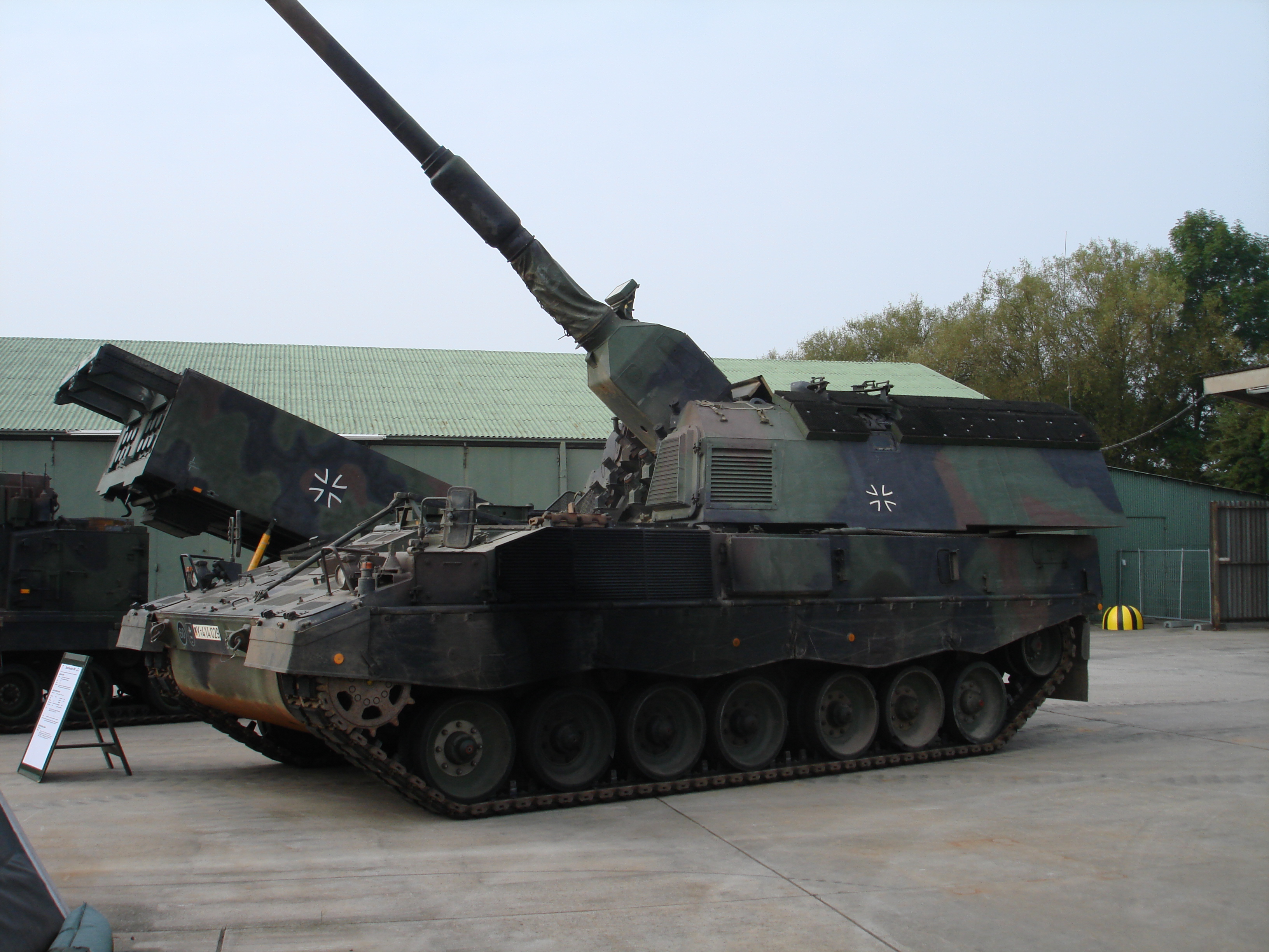 Panzerhaubitze 2000 beim Tag der offenen Tür der Wehrtechnische Dienststelle für Kraftfahrzeuge und Panzer (WTD 41) in Trier. Hinter der linken Turmfront befinden sich der Kompressor für das pneumatische System.